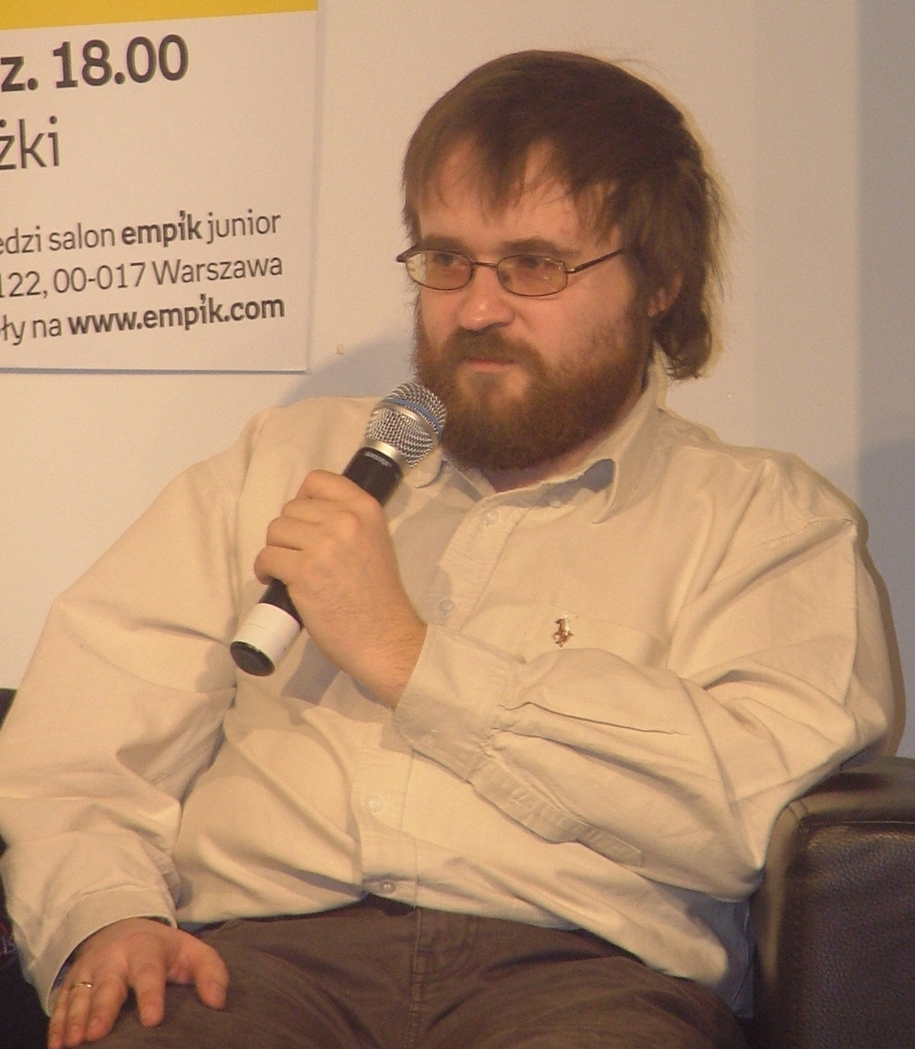 Warszawa, Empik Junior, Andrzej Pilipiuk